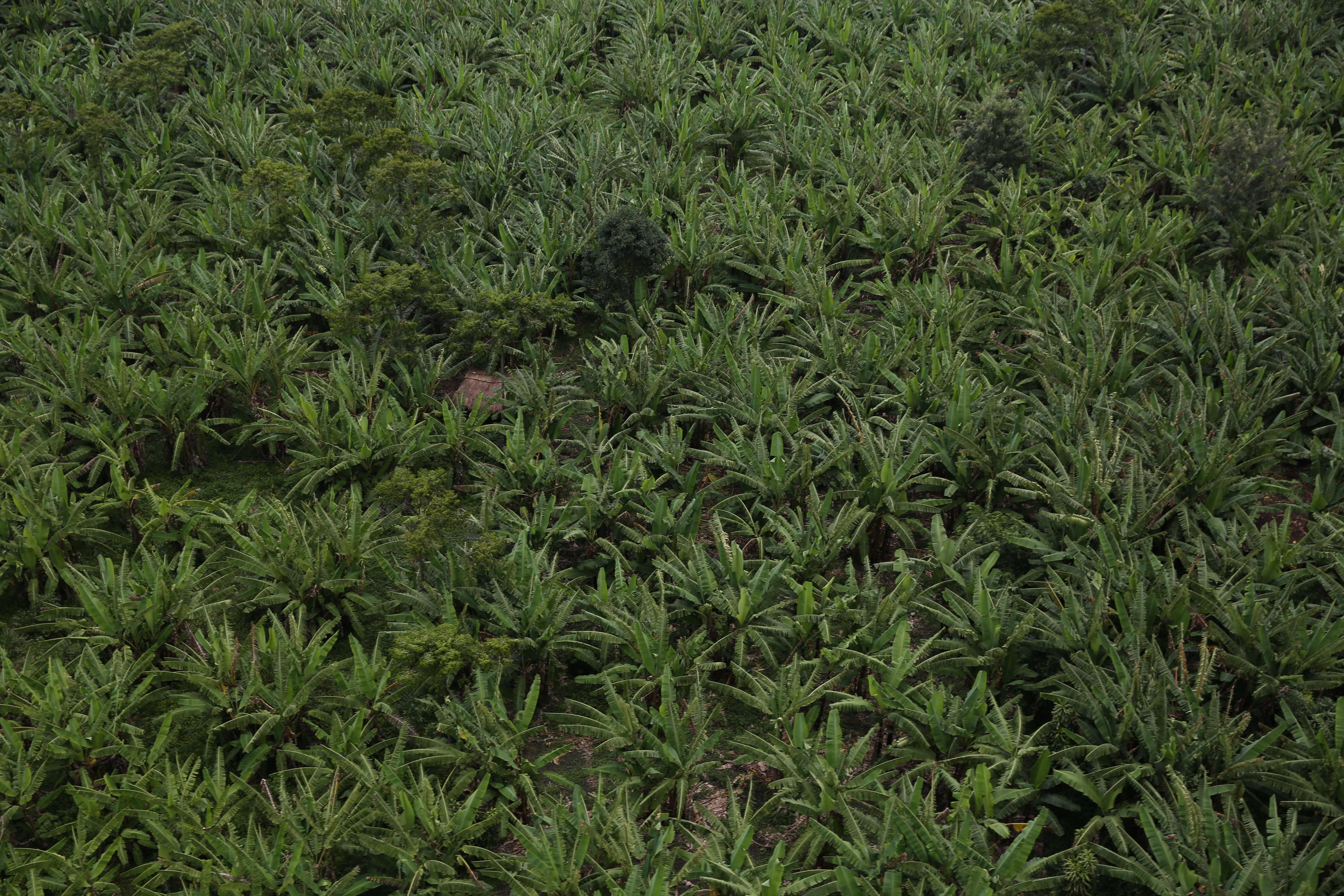 photo MONUSCO / Abel Kavanagh